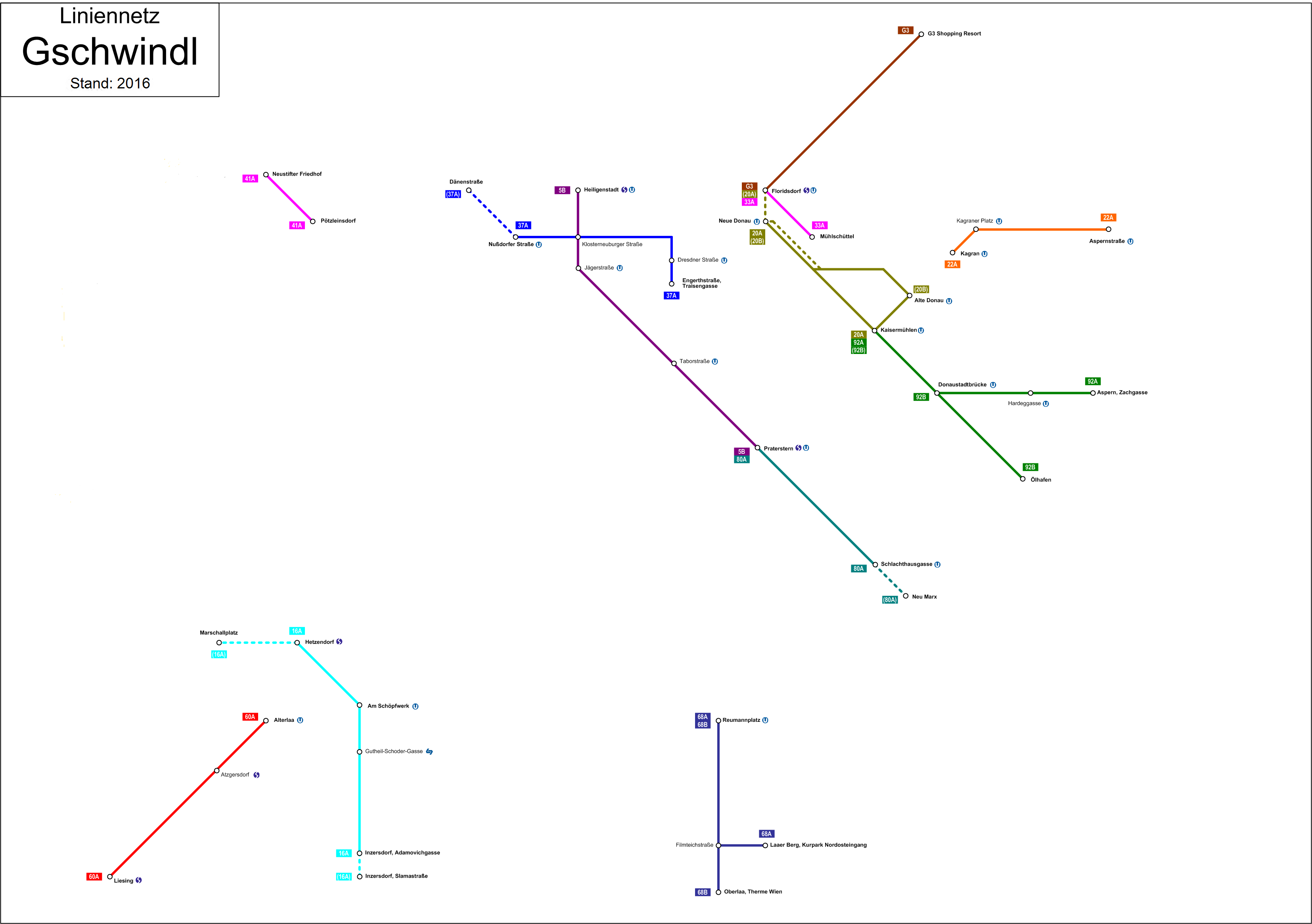 Das Liniennetz aller Wiener Buslinien welche von Gschwindl betrieben werden. Stand Dezember 2016. Vorige Version vom User @My Friend, von mir aktualisert.